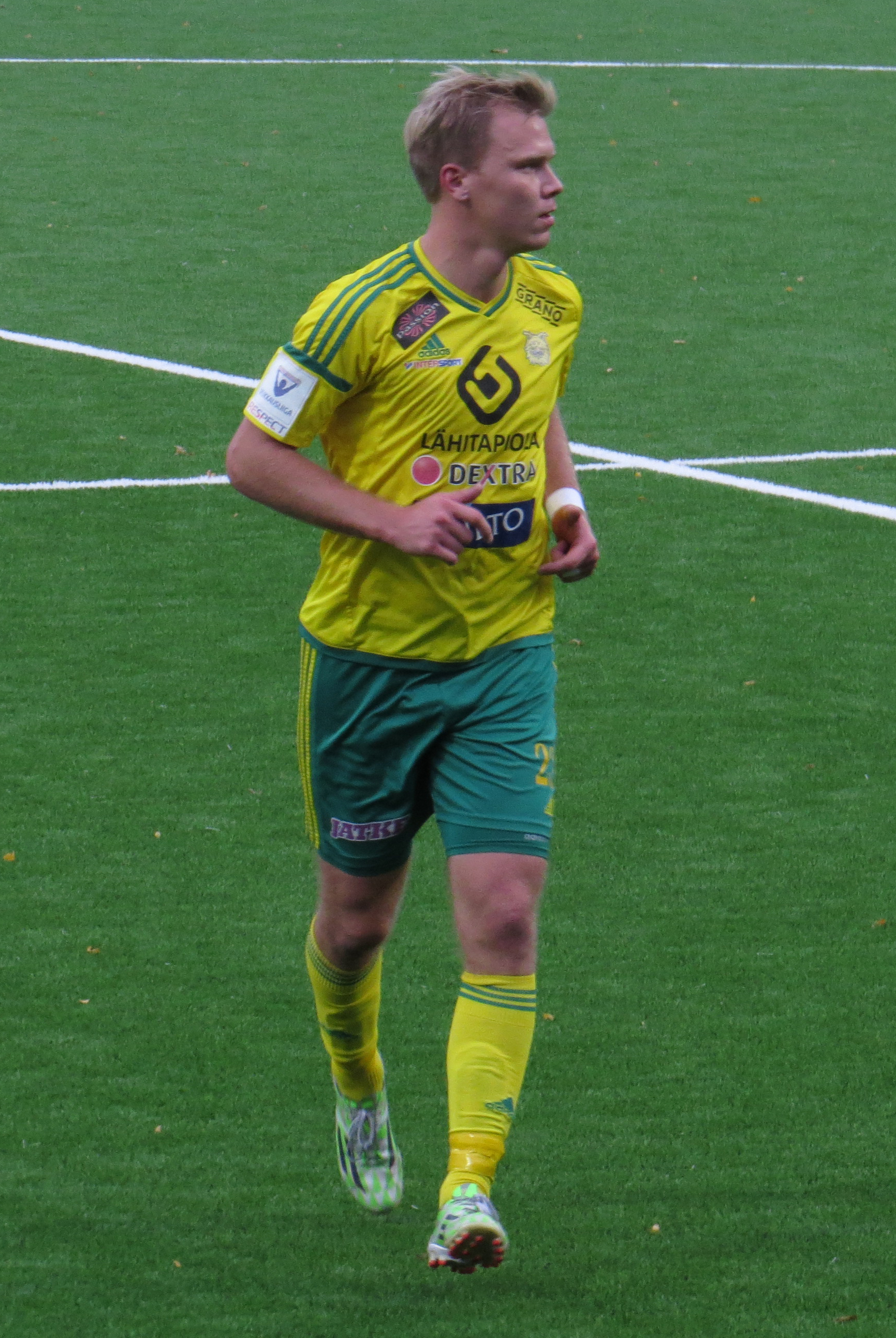 Mika Lahtinen, suomalainen jalkapalloilija Tampereen Ilveksen joukkueessa kaudella 2015.